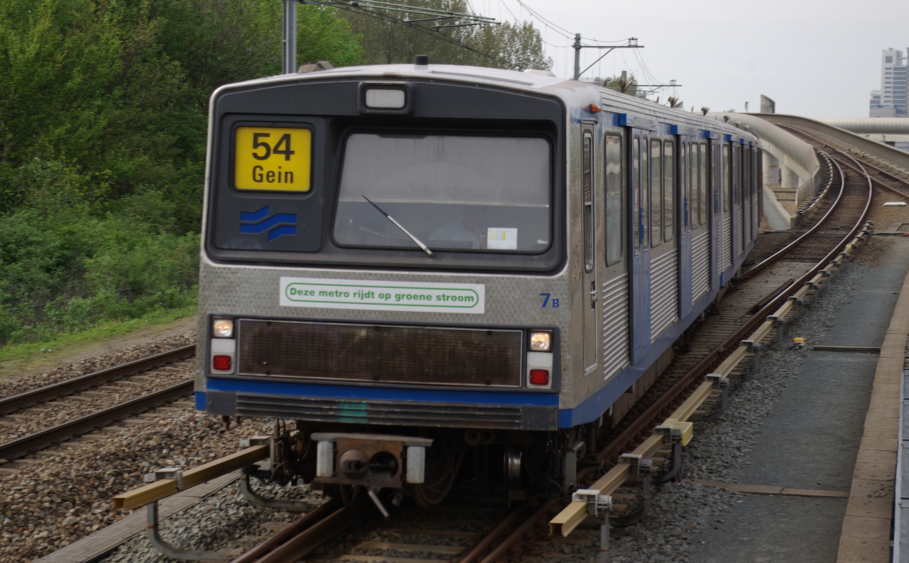 Amsterdamse metro, treinstel LHB M2